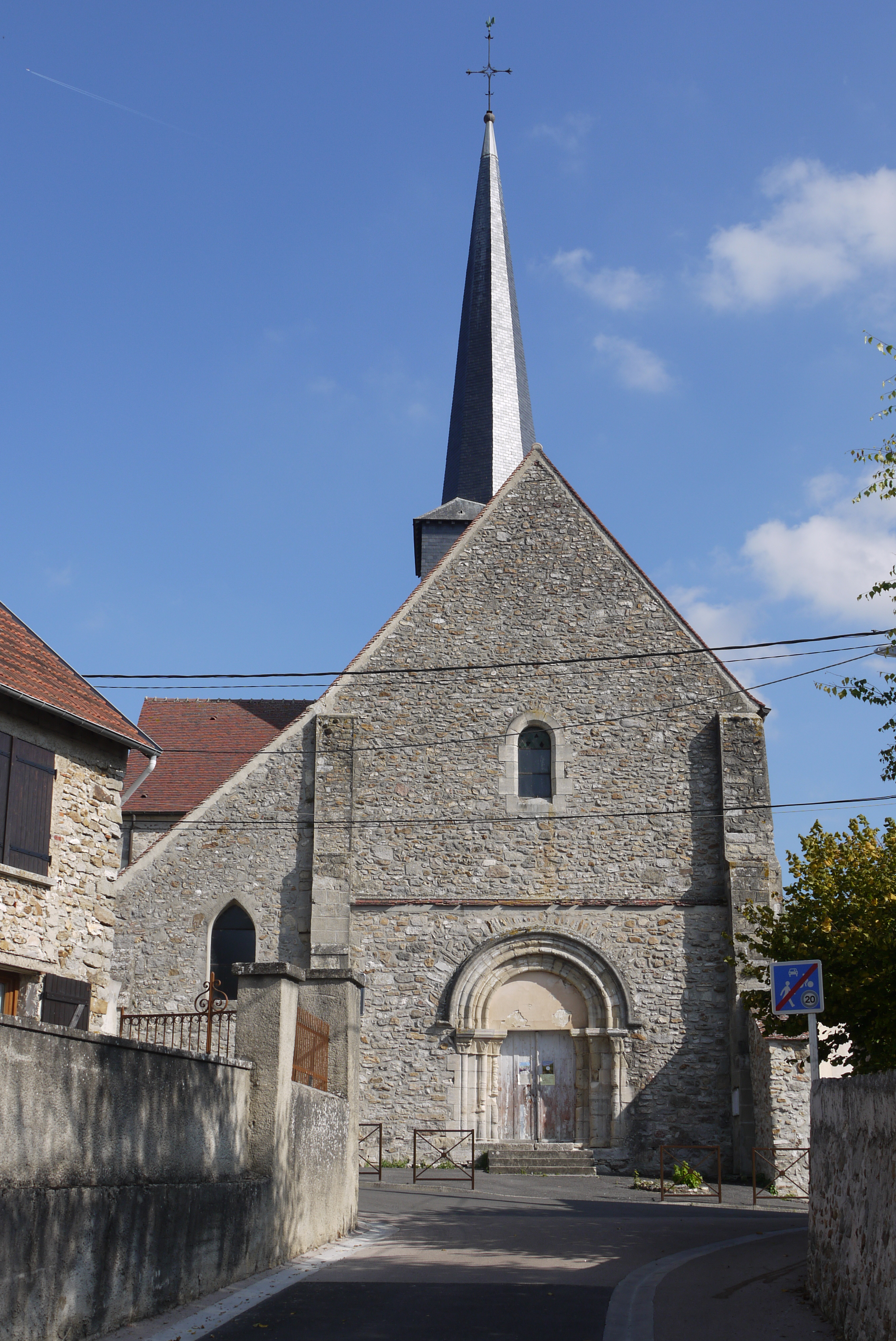 Église Saint-Martin de Nesles-la-Montagne.